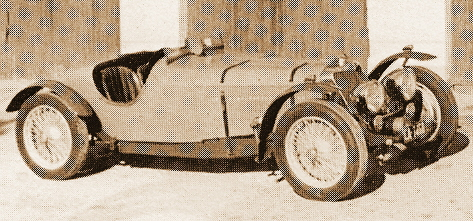 1935 Squire 1 1/2-litre